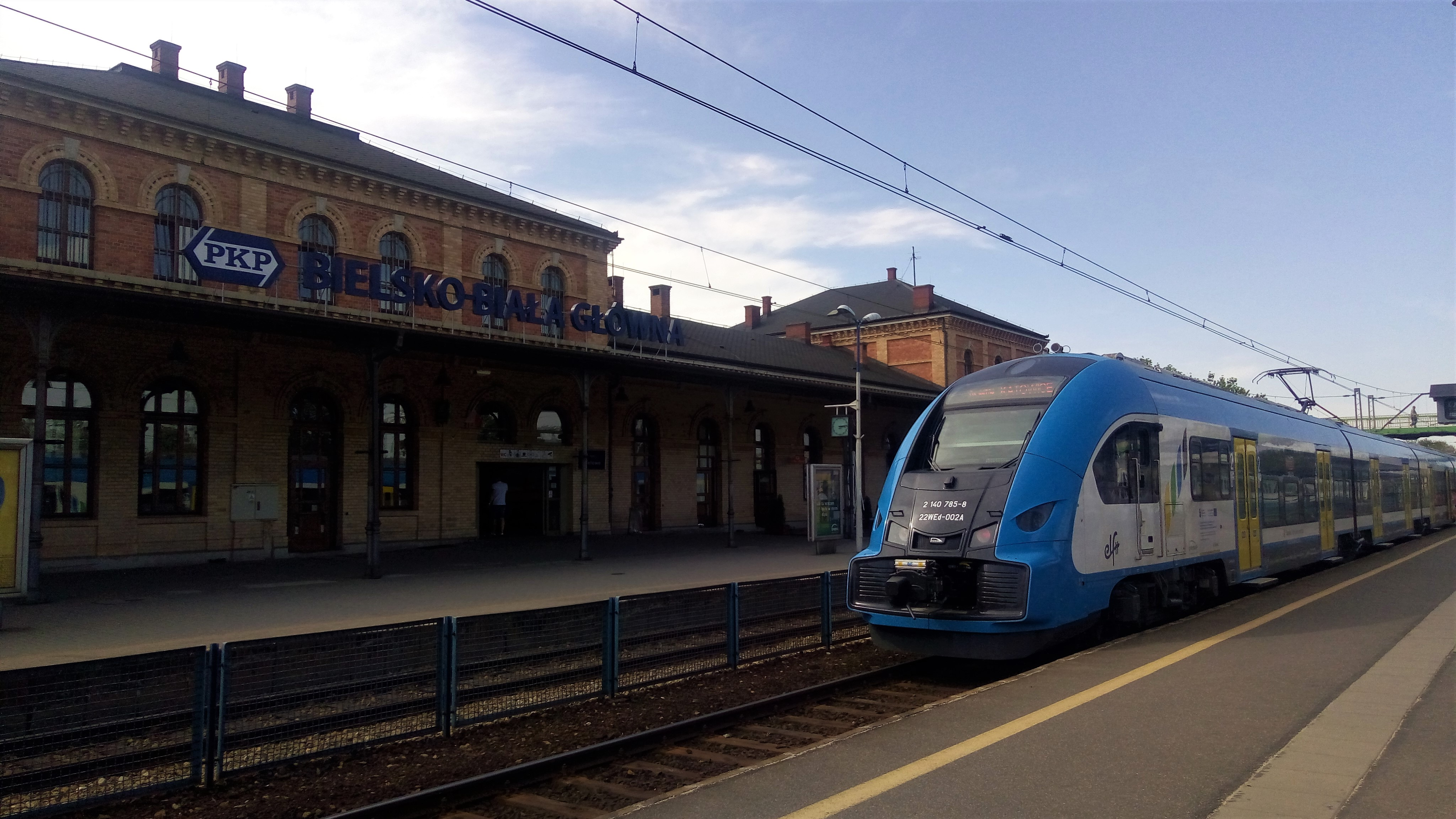 EZT 22WEd (Pesa Elf II) Kolei Śląskich na stacji Bielsko-Biała Główna jako pociąg osobowy S5 Bielsko-Biała Główna - Katowice